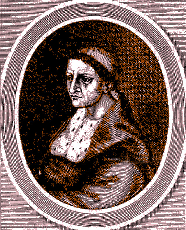 Cardinal Pierre Bertrand de Colombier